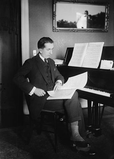 Alfredo Casella (1883 - 1947), Italian composer